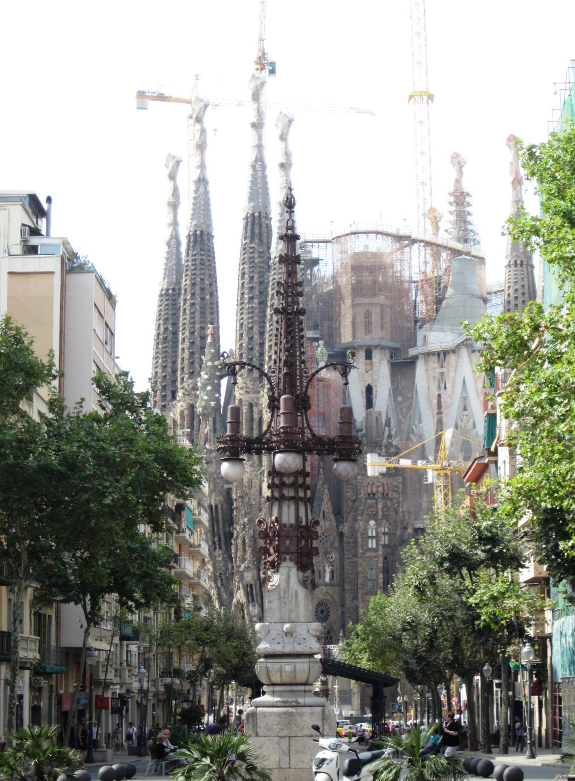 Sagrada Família vista des de l'Aviguda Gaudí